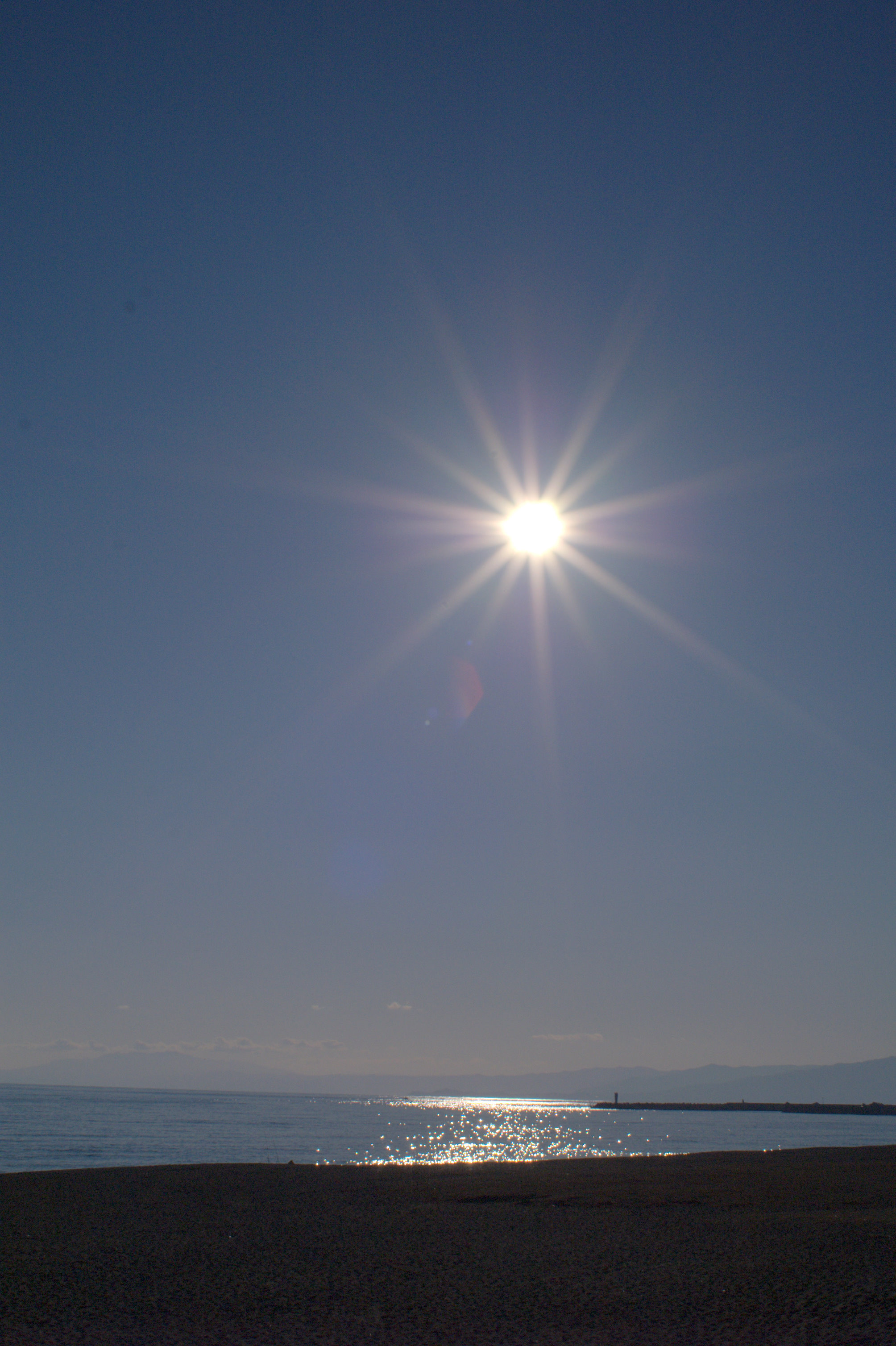 Sun shining sea